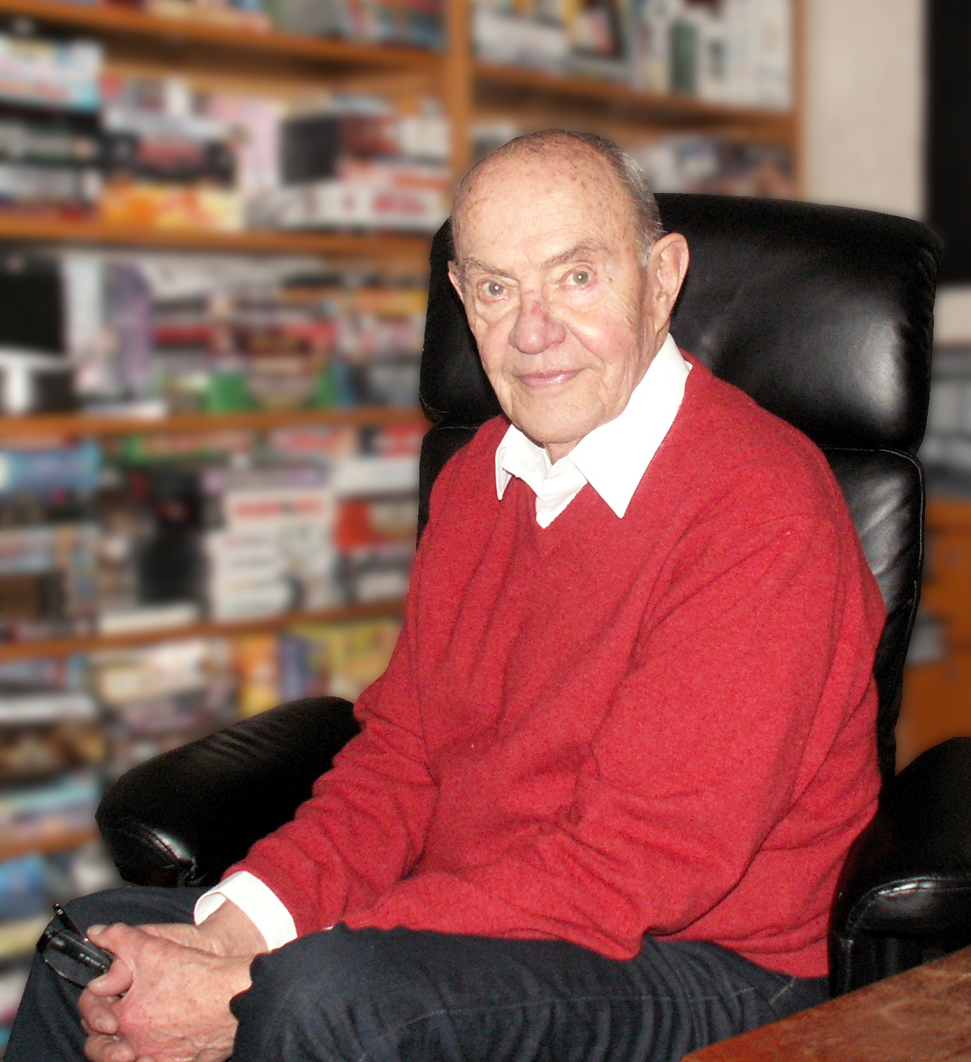 Skådespelaren och Frödinguttolkaren Per Elam. Fotot är efterbehandlat (oskarp bakgrund).